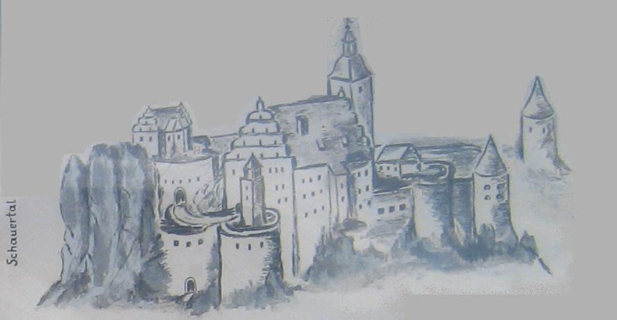 Rekonstruktion der Burg Streitburg um das Jahr 1760 in Streitberg; own work. Quelle: Gustav Voit, gemeinfrei durch Panoramafreiheit